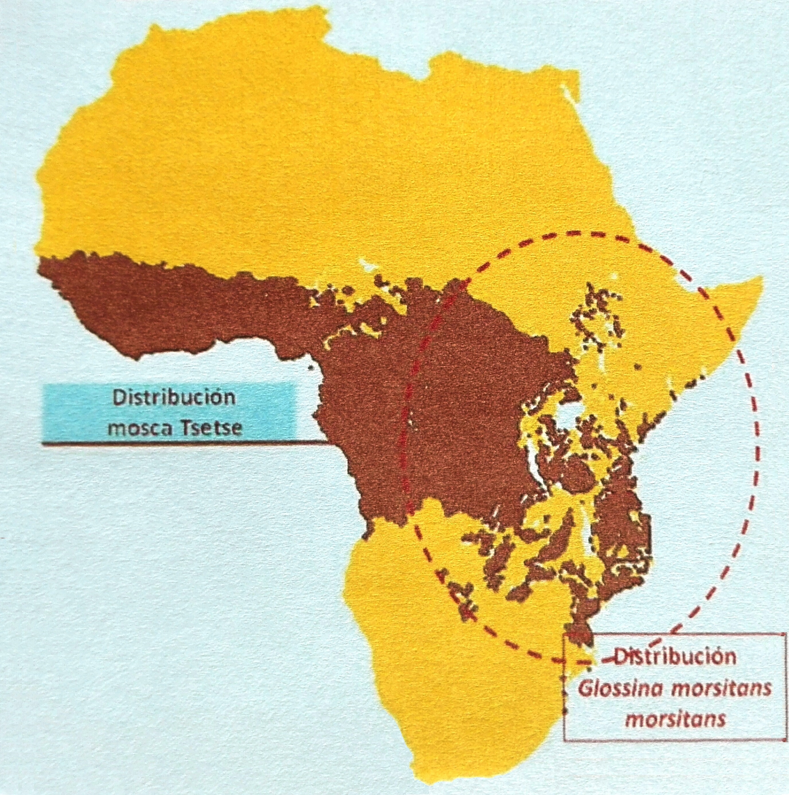 Área de distribución general de las moscas tsetse y en particular de Glossina morsitans morsitans